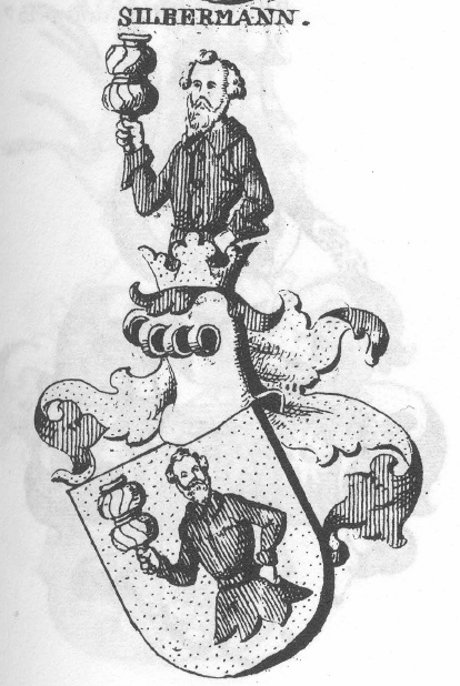 Wappen der Familie Silbermann